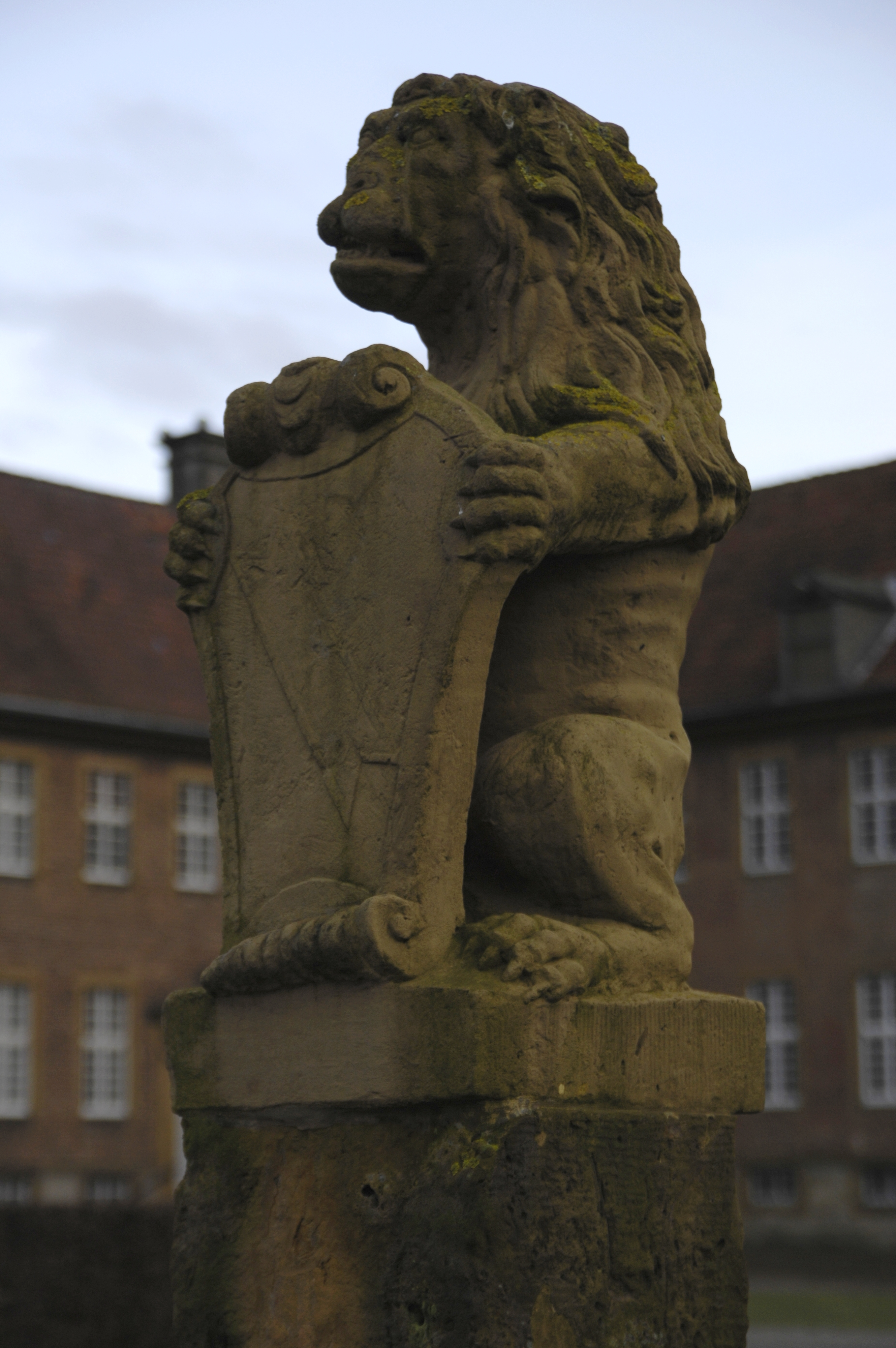 Clarholz, Sandstein-Löwe am Portal